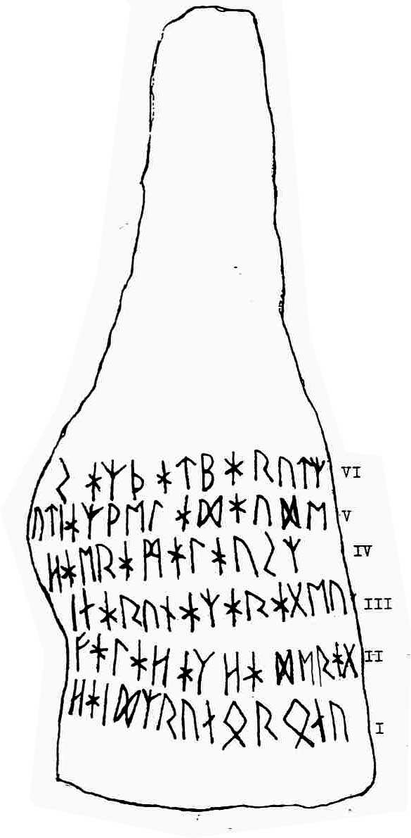 Runtexten på Björketorpstenen i Blekinge